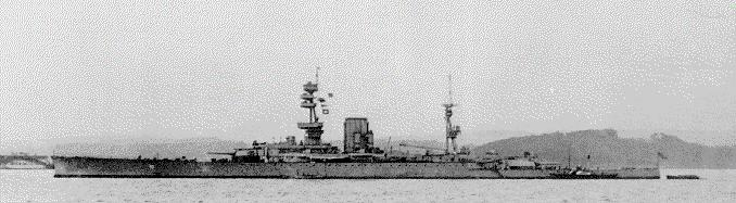 HMS Glorius como cruzador de batalha